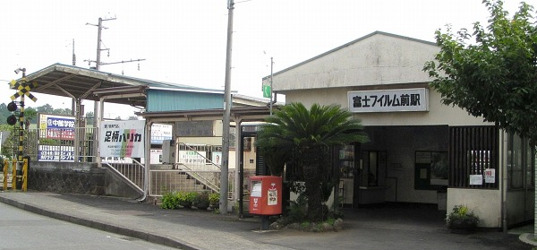 Fujifilm-Mae Station, on the Izuhakone Daiyūzan Line, Minamiashgara, Kanagawa 富士フイルム前駅